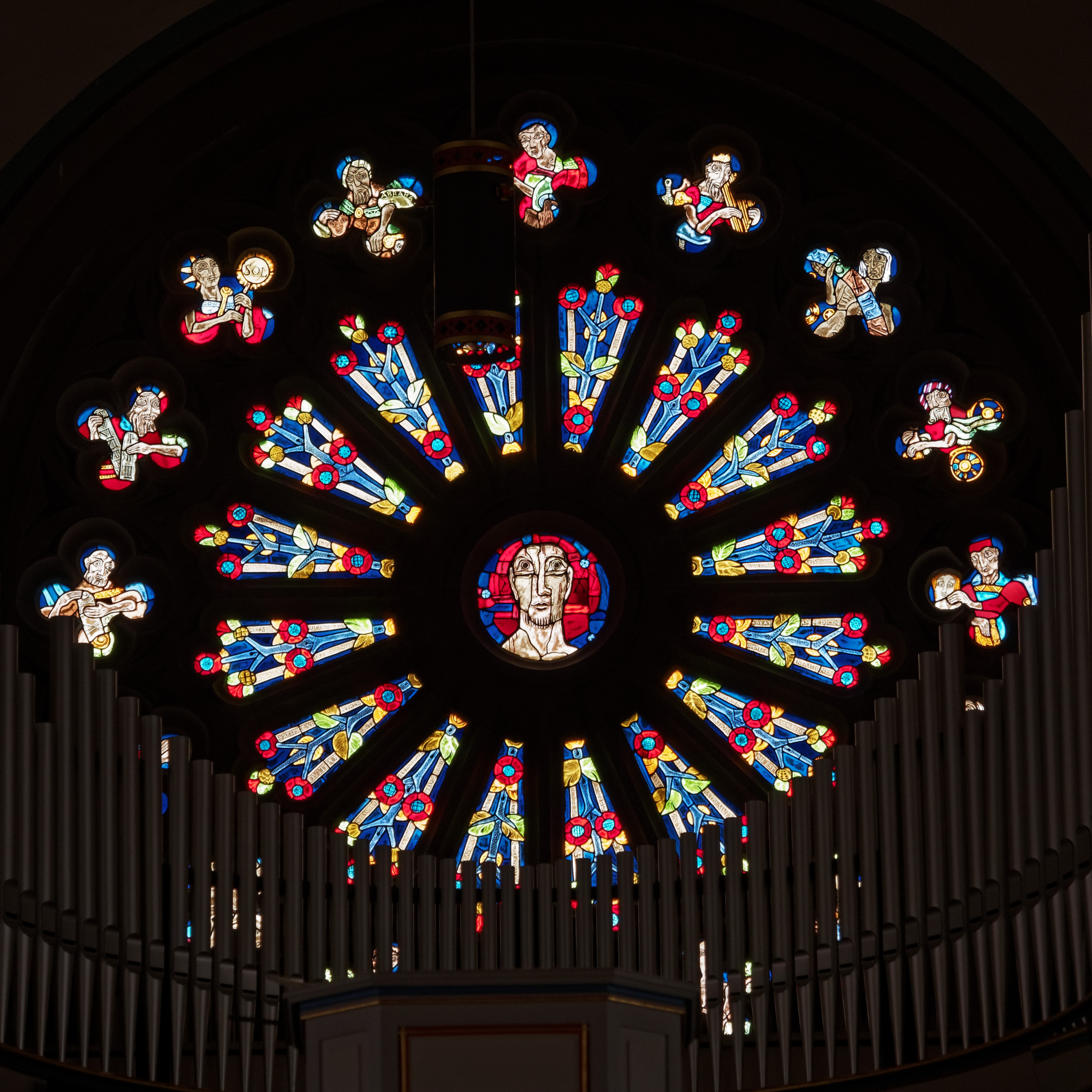 Oberstaufen St. Pater und Paul, Rosettenfenster von innen gesehen, Baudenkmal